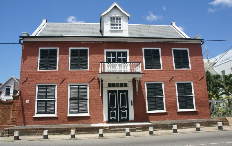 Henck Arronstraat 12, Paramaribo, Suriname